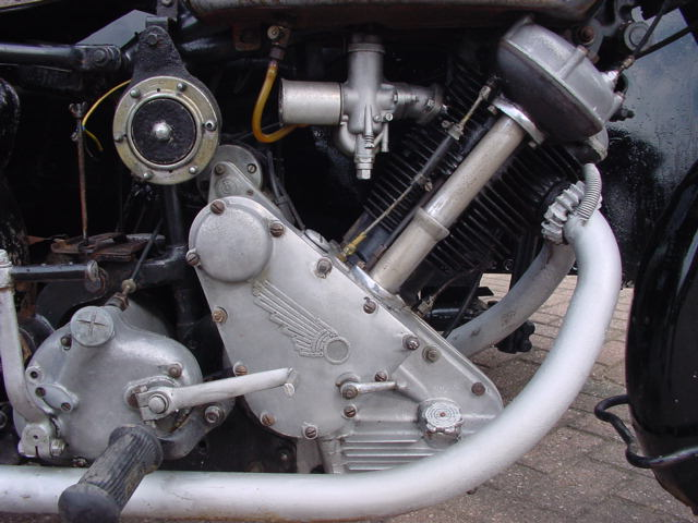 P&M Model 120 600 cc sloper engine from 1964